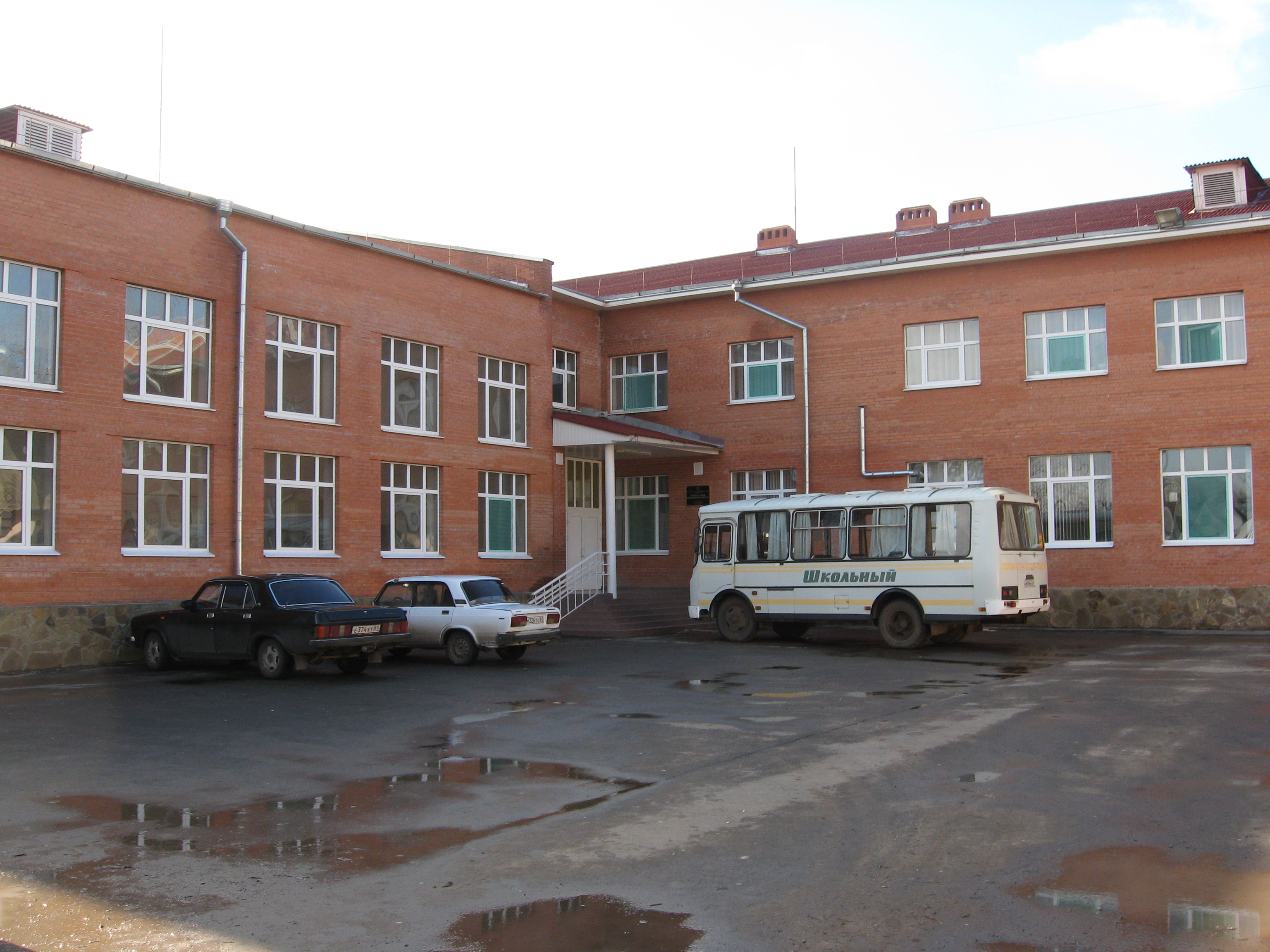 Здание МБОУ СОШ №4 с. Самарского